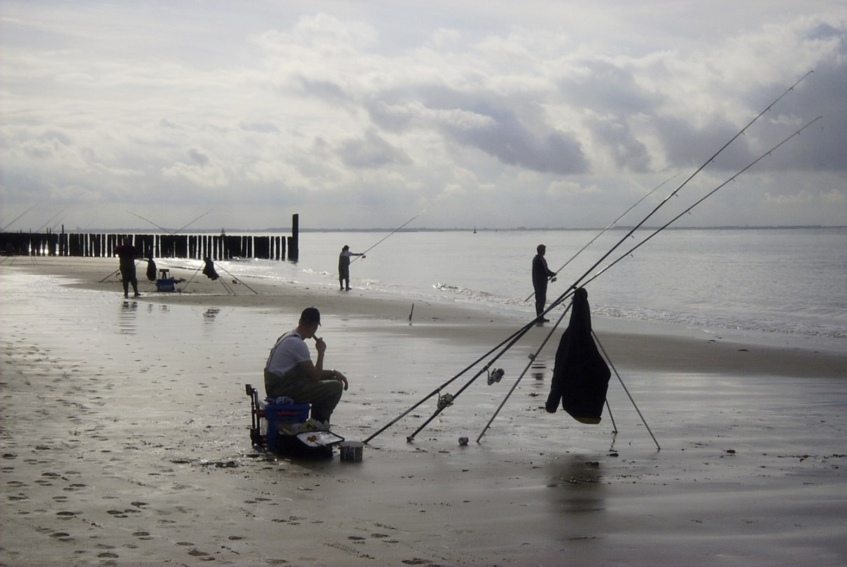 Angler am Zoutelander Strand